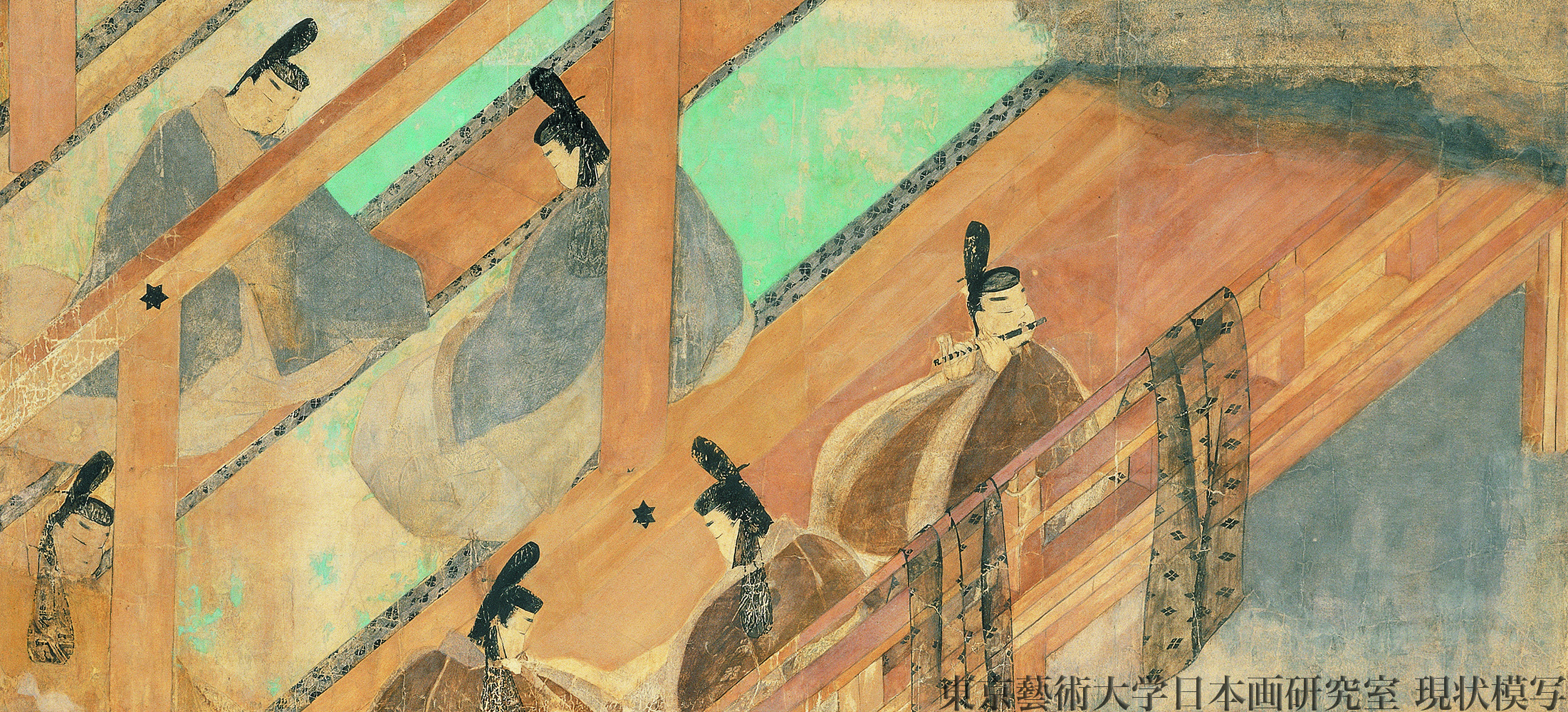 紙本著色／一面 平安時代後期・12世紀 縦21.8cm 横48.2cm 五島美術館蔵 『源氏物語』第３８帖「鈴虫」の二番目の場面。月見の宴に招かれた光源氏が、弟の冷泉院（実は源氏と継母藤壺との不義の子）と対座し語り合う。右上の群青の空と銀の満月が夜を象徴する。天井を取り去り室内を表現する「吹抜屋台」の技法で描く。